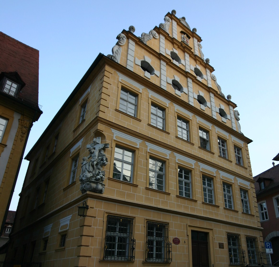 Blick auf den "Alten Ebracher Hof" in Bamberg